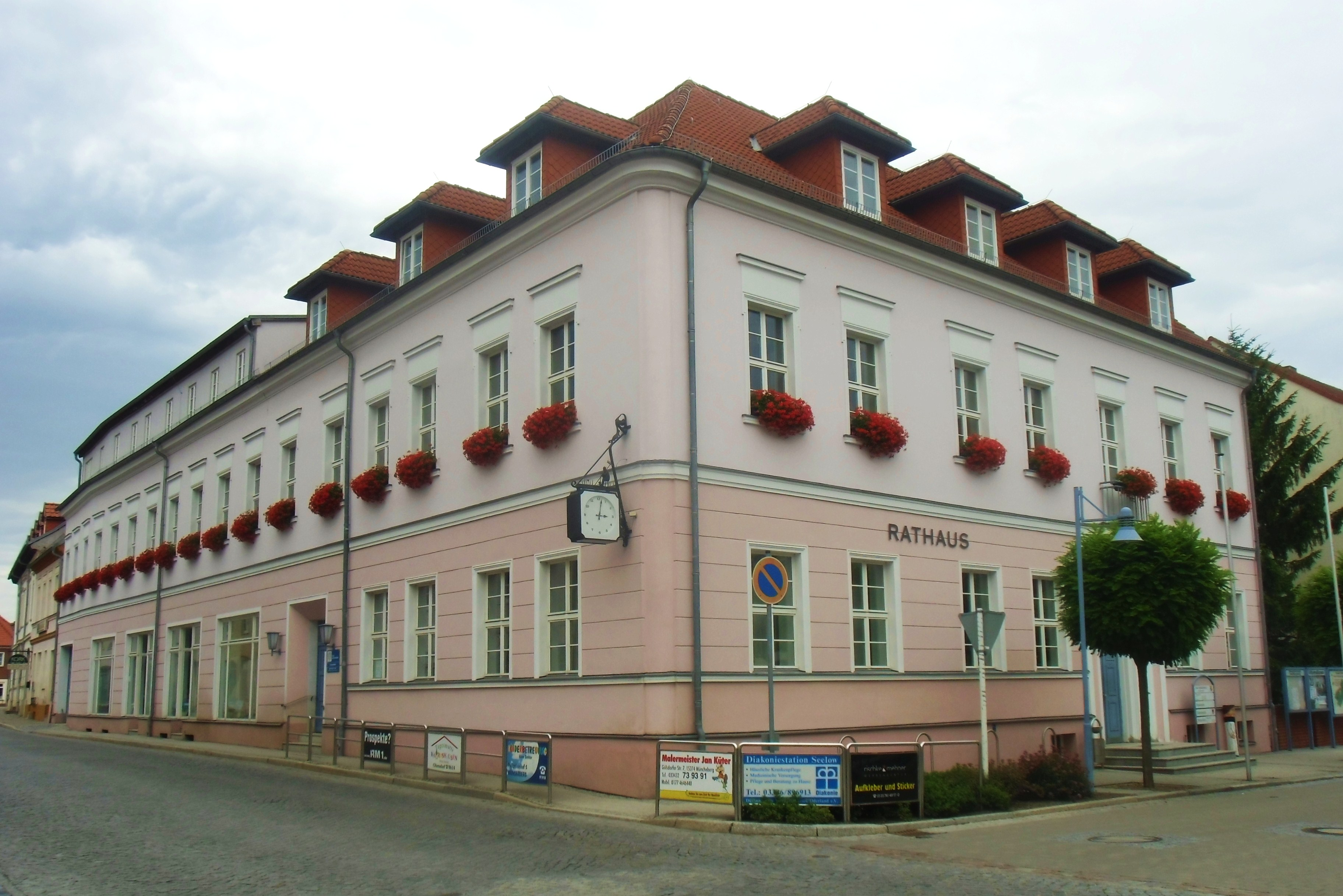 Sitz der Stadtverwaltung von Müncheberg, Rathausstraße 1